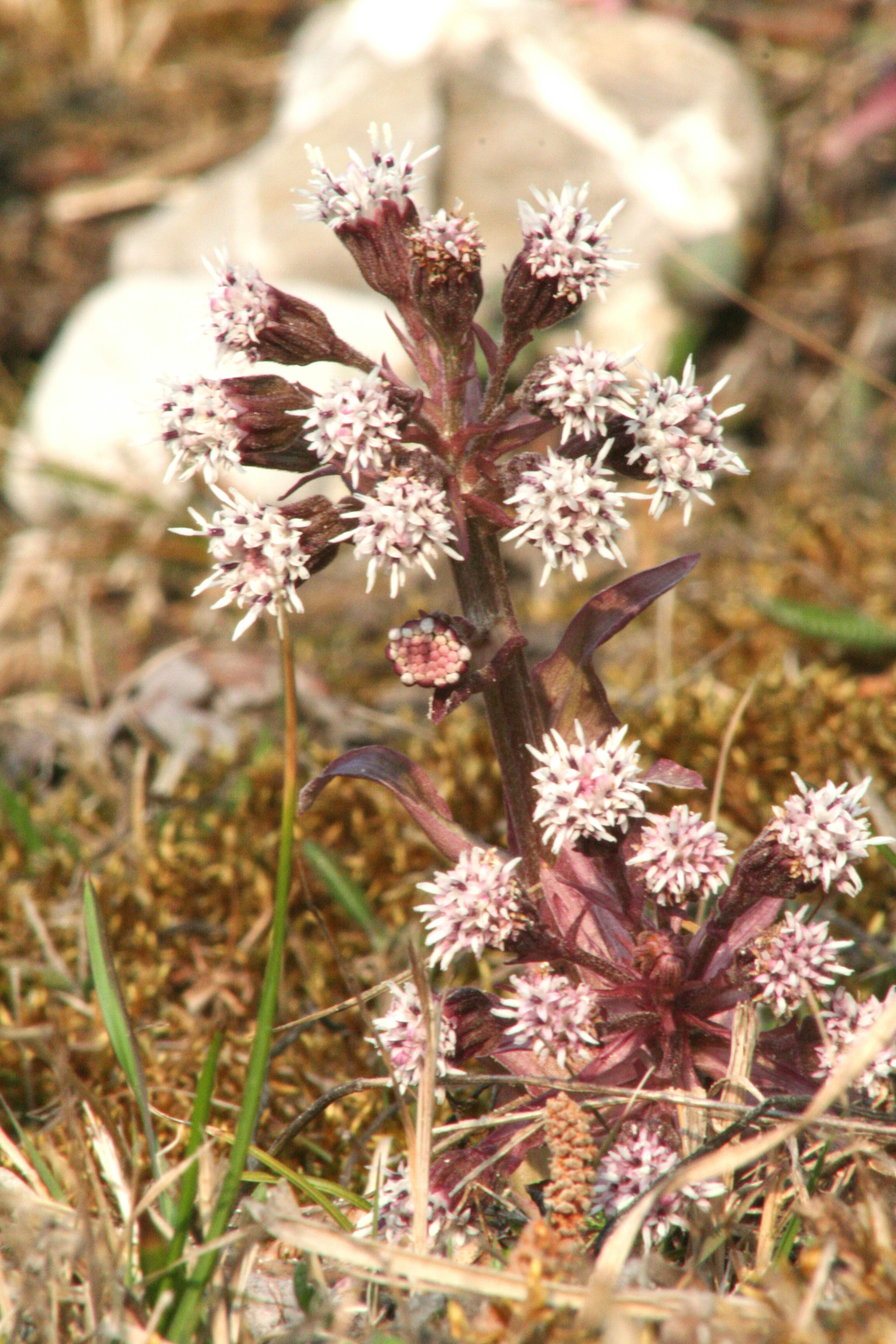 Farfaraccio niveo - Località : Le Laste, Limana (BL), 661 m s.l.m.